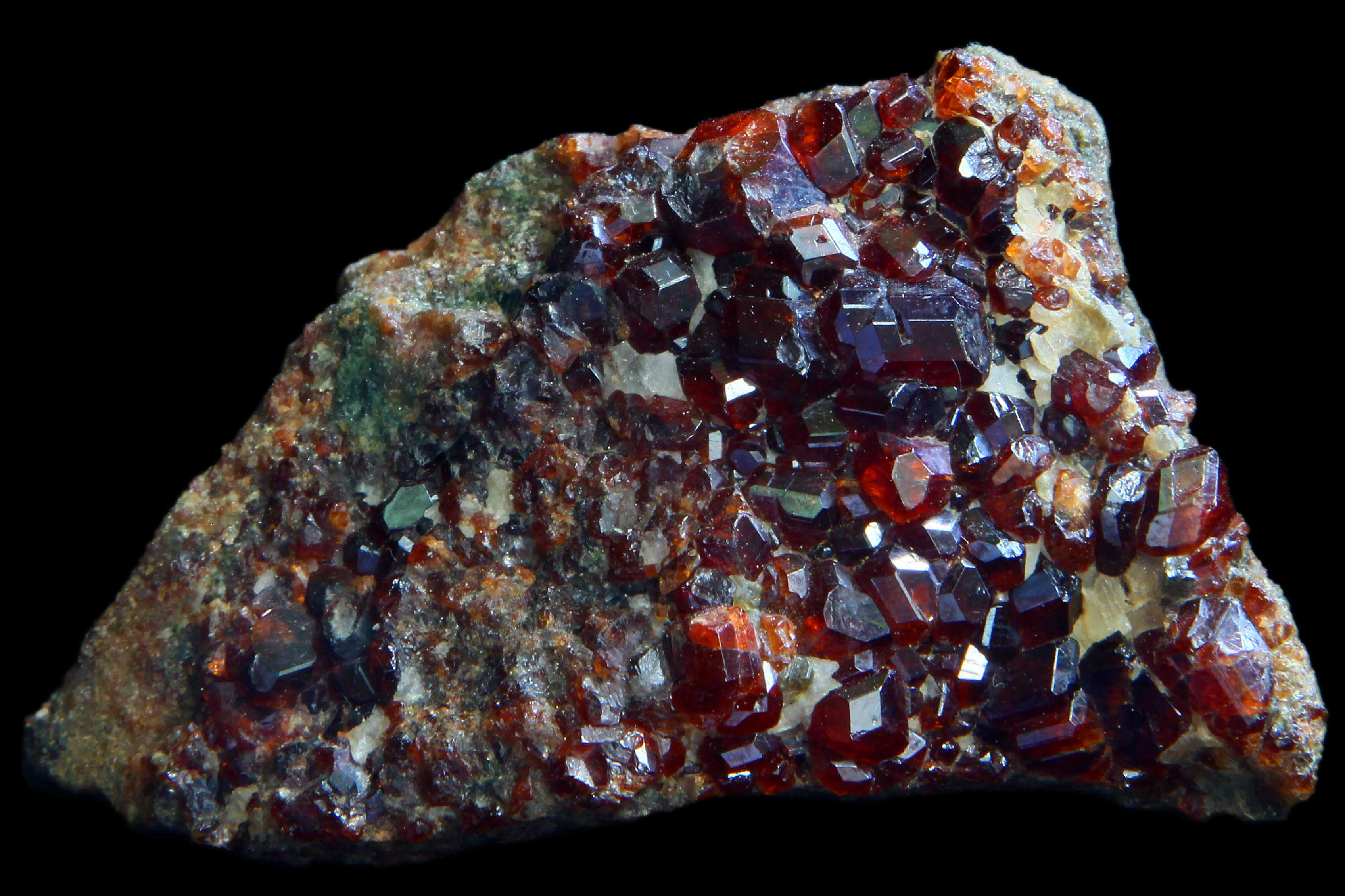 Granat (garnet), andradyt - Gilgit, Baltistan, Pakistan.